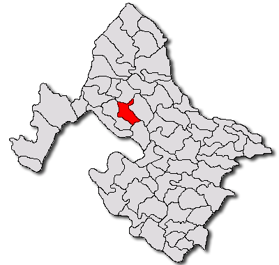 Categorie:Hărţi ale judeţului Mehedinţi